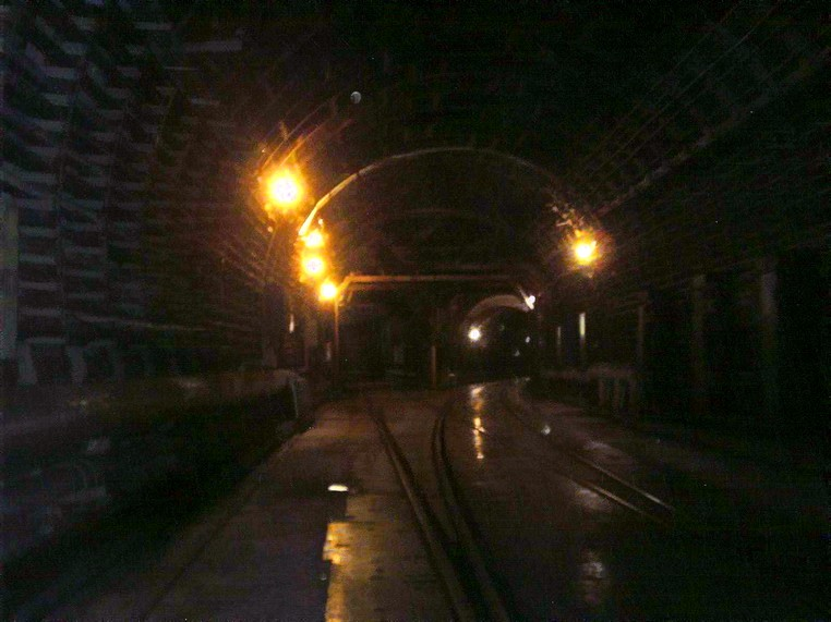 Камера съездов линии Д6 метрополитена Москвы